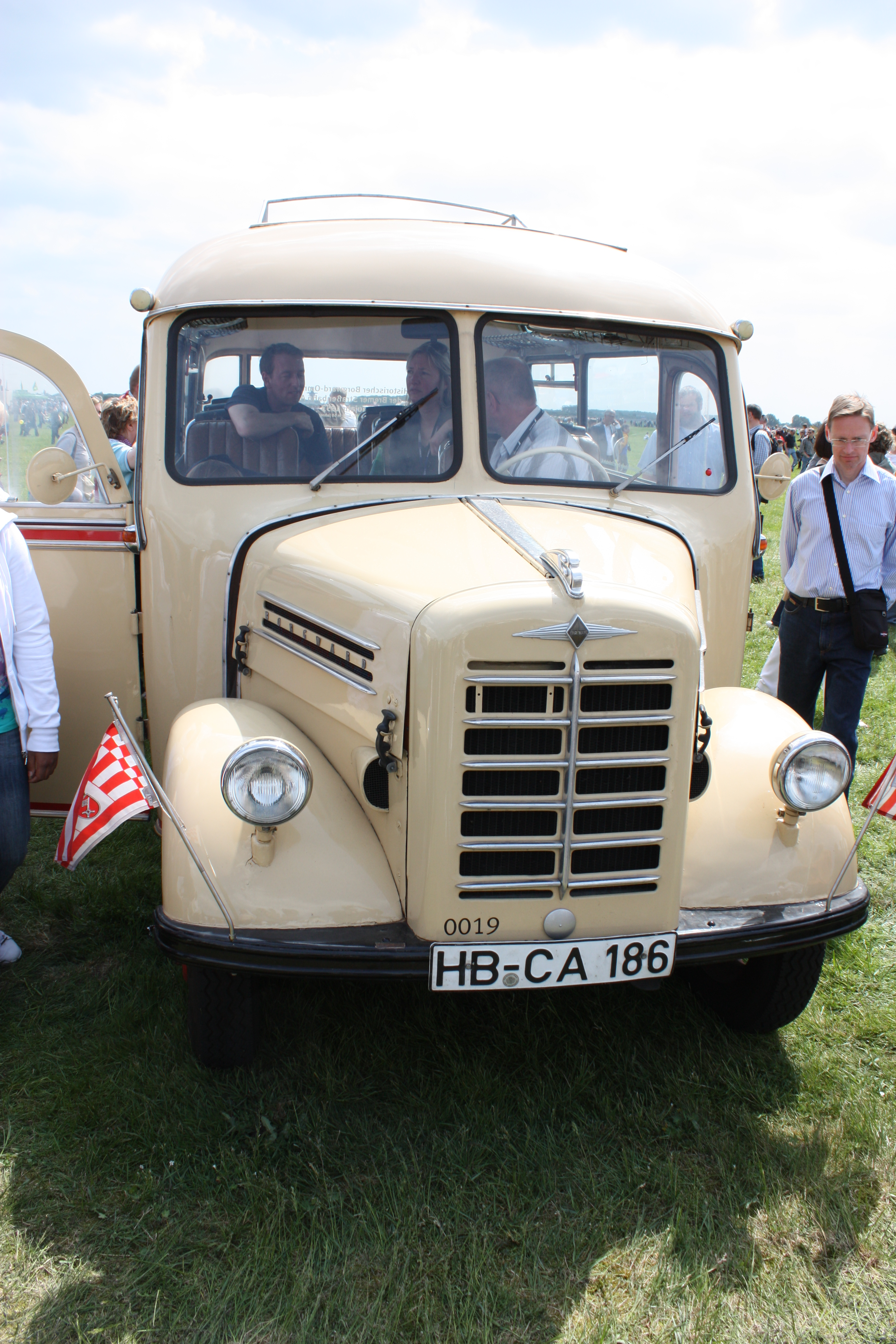 Vintage cars at Bremen Airport Flugtag 2009; Oldtimer; Historischer Borgward Bus: 1953, restauriert 1978, Hersteller Borgward, Aufbau Pollmann; Länge 5400 mm; Breite 2000 mm; Höhe über DAch 2500 mm; Sitzplätze ohne Personal/Stehplätze 14/keine; Leergewicht 2060 kg; Gesamtgewicht 3065 kg; Motor: Mercedes Benz Diesel; Leistung 32 kW; 4 Gang Schaltgetriebe; Bremse: kpl. Trommelbremse; zulässige Höchstgeschwindigkeit 75 kmh; im Besitz der BSAG; Fahrzeug ist zu vermieten